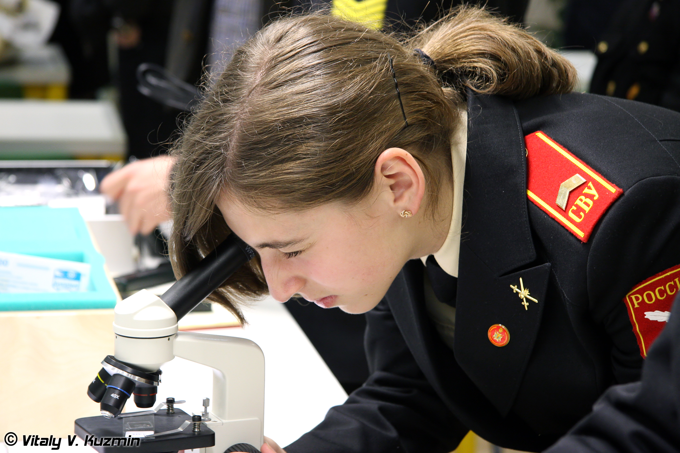 Московское суворовское военное училище (Moscow Suvorov Military School)